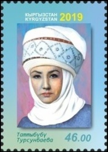 Tattybübü Tursunbayeva